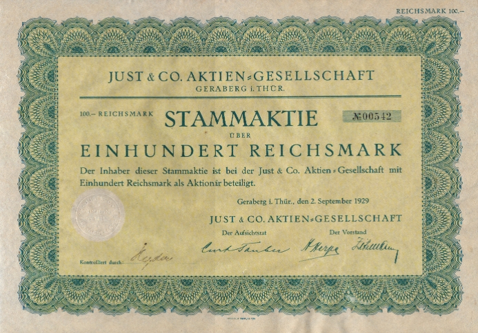 Aktie der der Kust & Co. AG Geraberg aus dem Jahr 1929